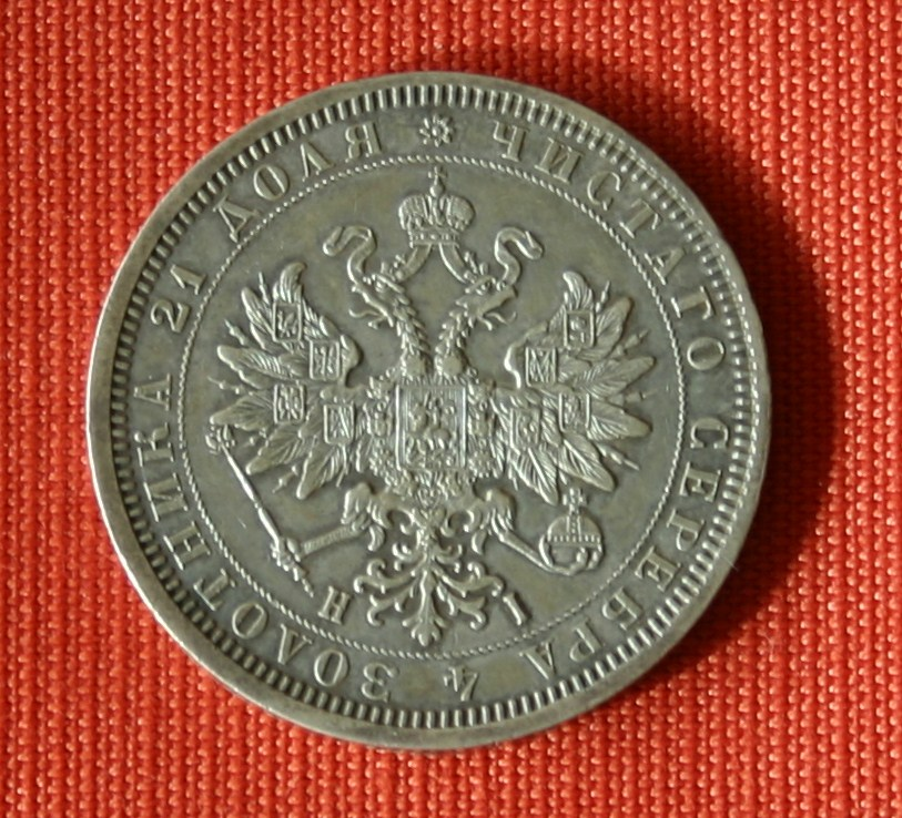 Revers Rubelmünze Alexander II aus 1877 St.Petersburg